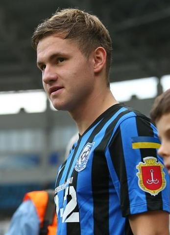 Владислав Калітвінцев - футболіст Чорноморця (Одеса)